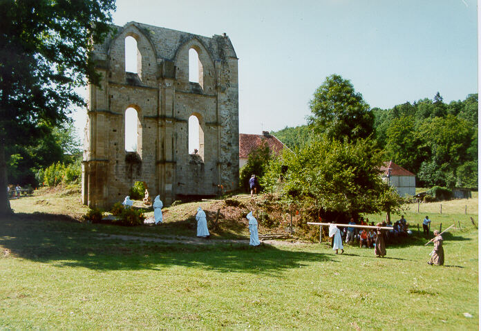 Les vestiges de l'église de Cherlieu, lors du 9ème centenaire de l'abbaye